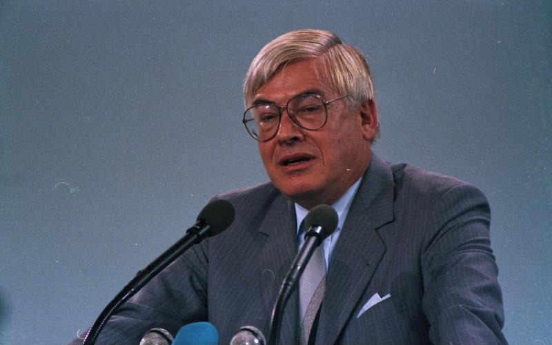 7./8.10.1986 34. Bundesparteitag der CDU in der Rheingoldhalle, Mainz (6.-8.10.1986).